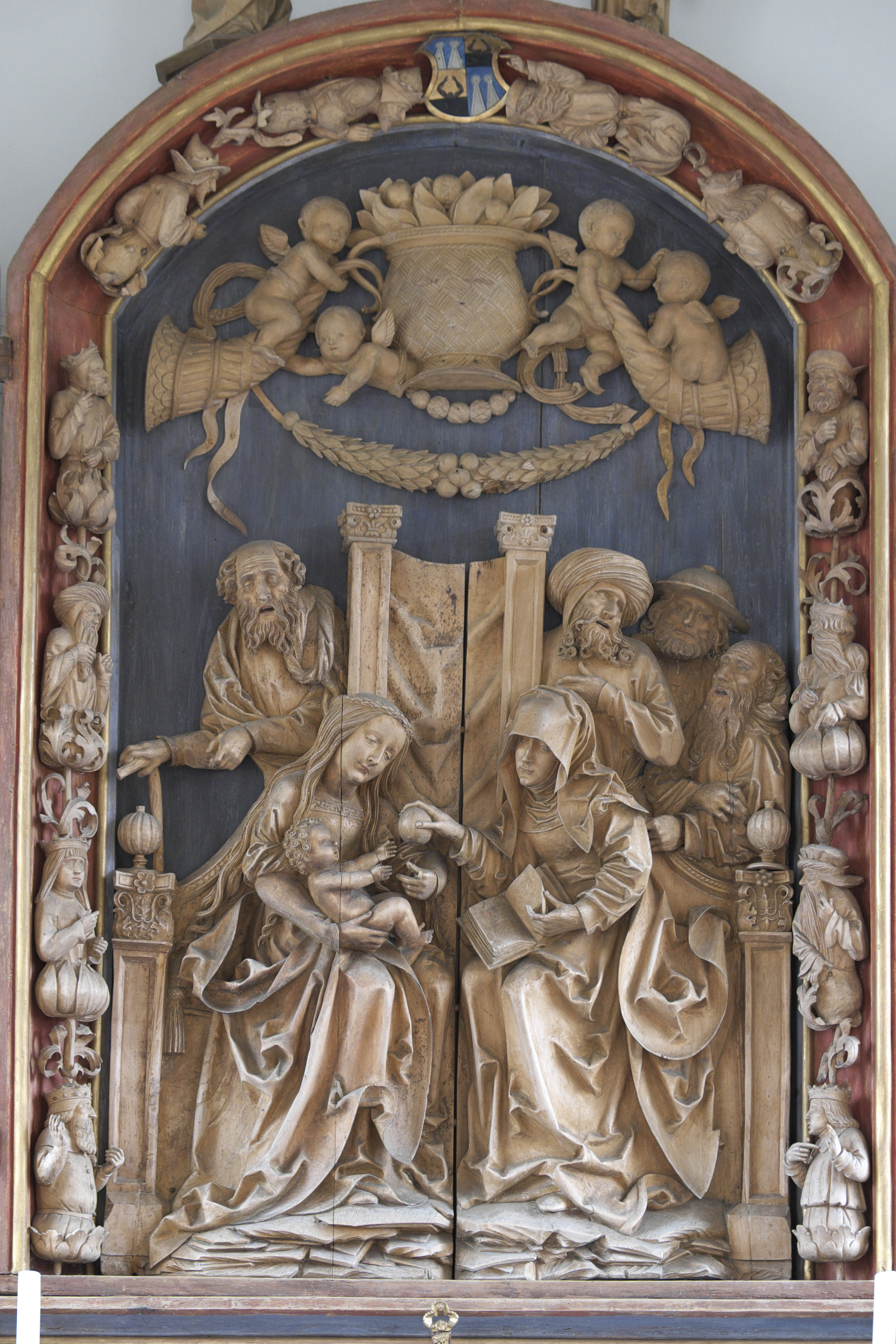 Altar mit der Darstellung der Heiligen Sippe in der katholischen Kapelle Franz Xaver in Bieselbach, einem Ortsteil von Horgau im Landkreis Augsburg; aus Lindenholz geschnitzt von dem Bildhauer Daniel Mauch, um 1510. Mittelteil mit der Darstellung der hl. Anna, Marias mit dem Jesuskind und des greisen Joseph, hinter Anna stehen ihre drei Ehemänner Joachim, Cleophas und Salomas, dahinter Propheten und Könige des Alten Testaments